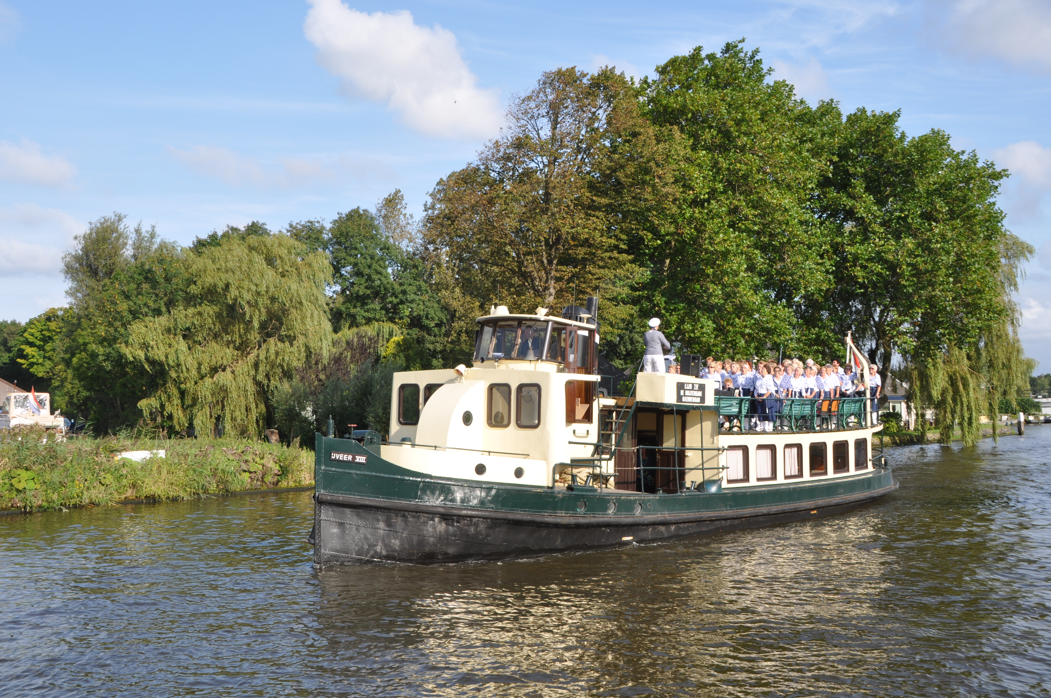 IJveer VIII op de Vliet. Bouwjaar 1922